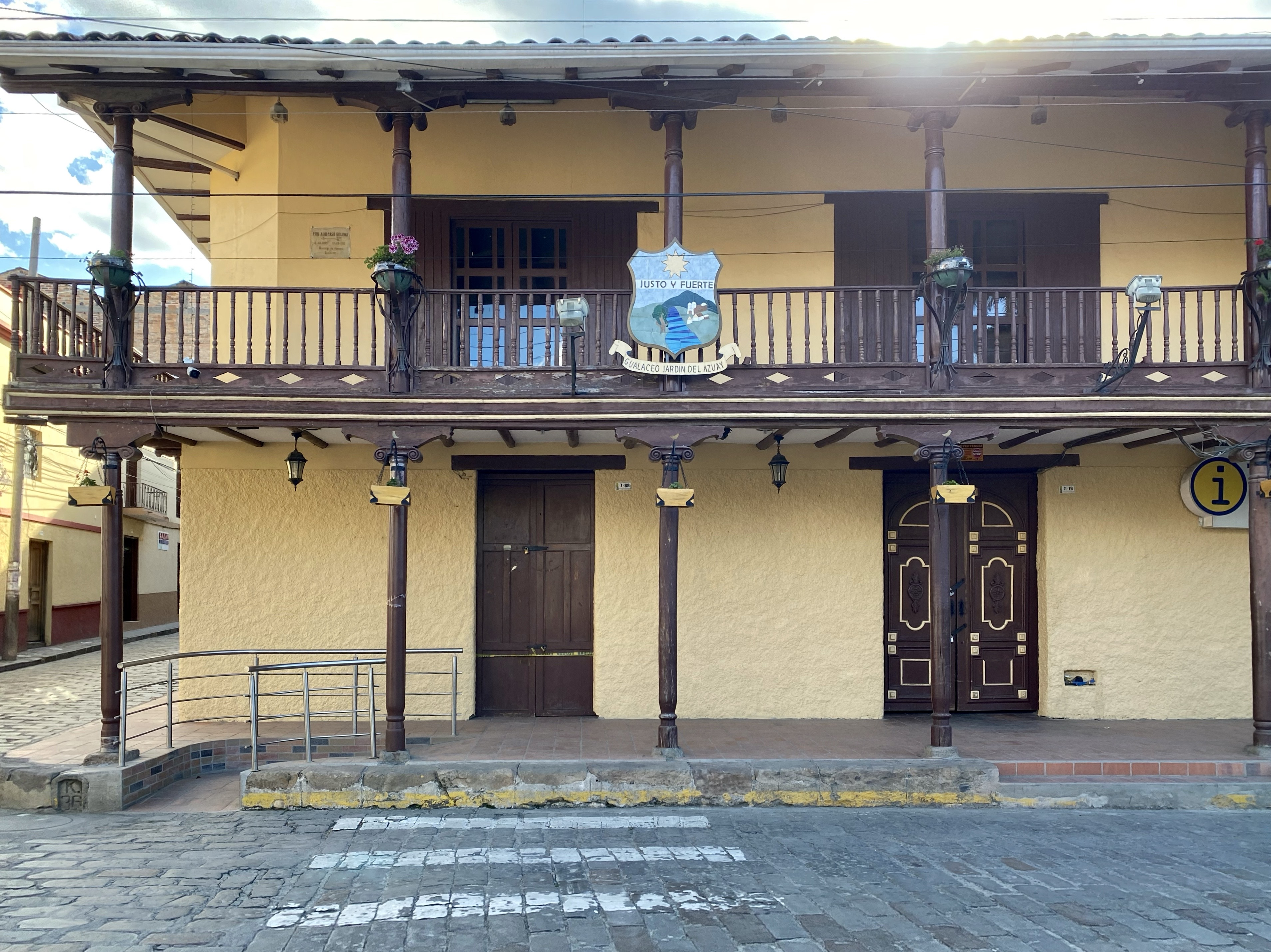 Lugar en donde se desempeñan las funciones de la Municipalidad del Cantón Gualaceo